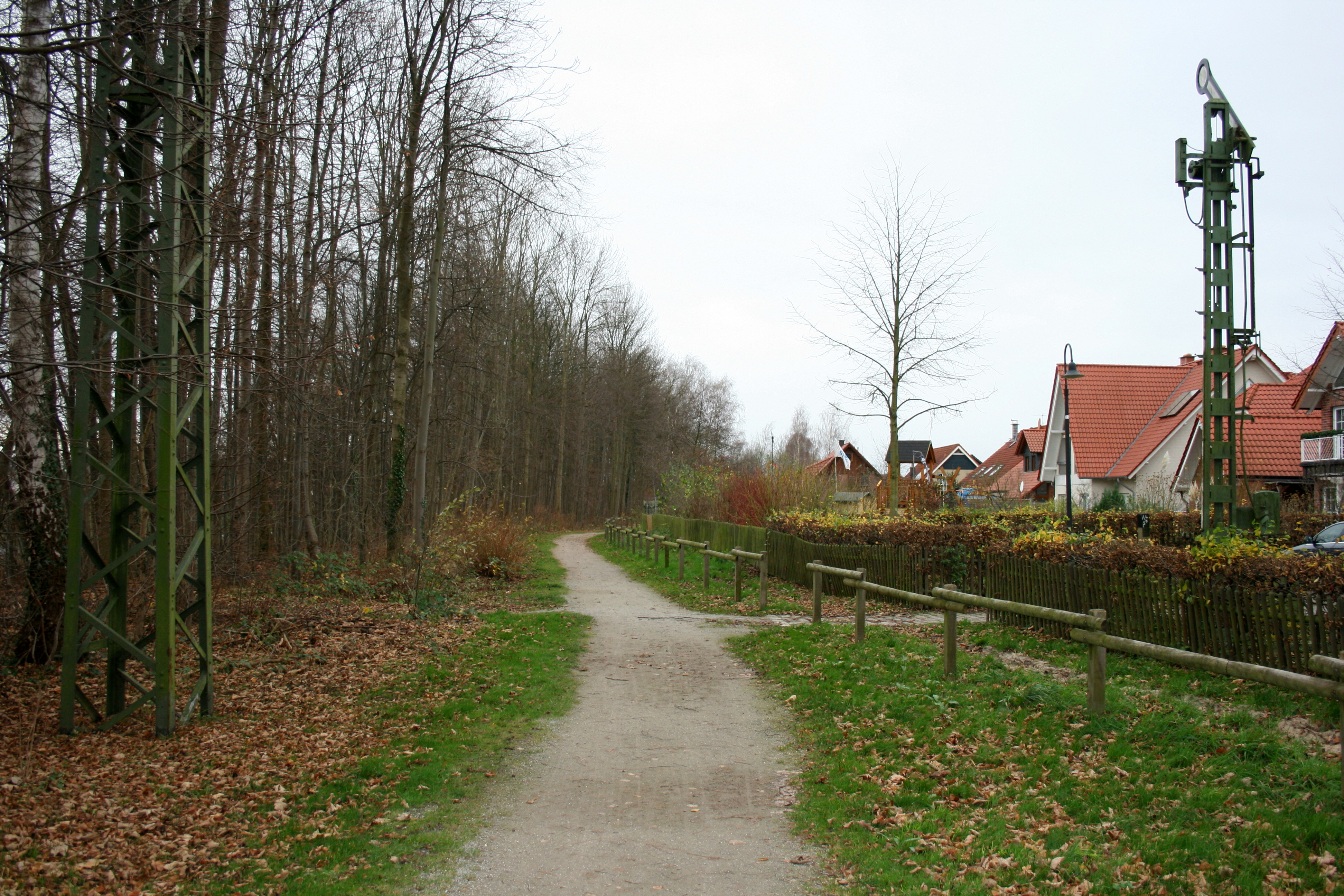 Ehemalige Strecke am Empfangsgebäude Bahnhof Lenningsen –jetzt Rad- und Wanderweg